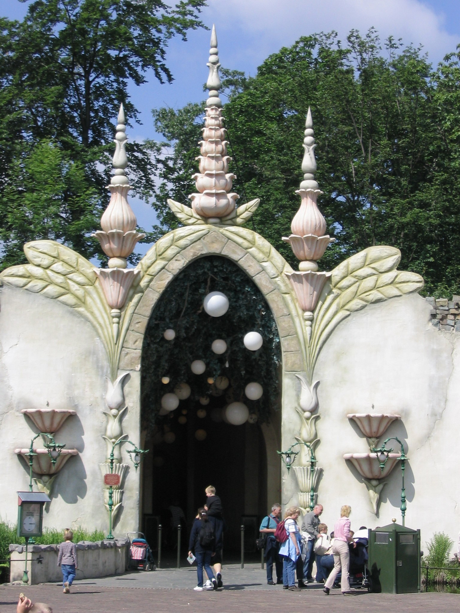 Efteling Entrance Droomvlucht